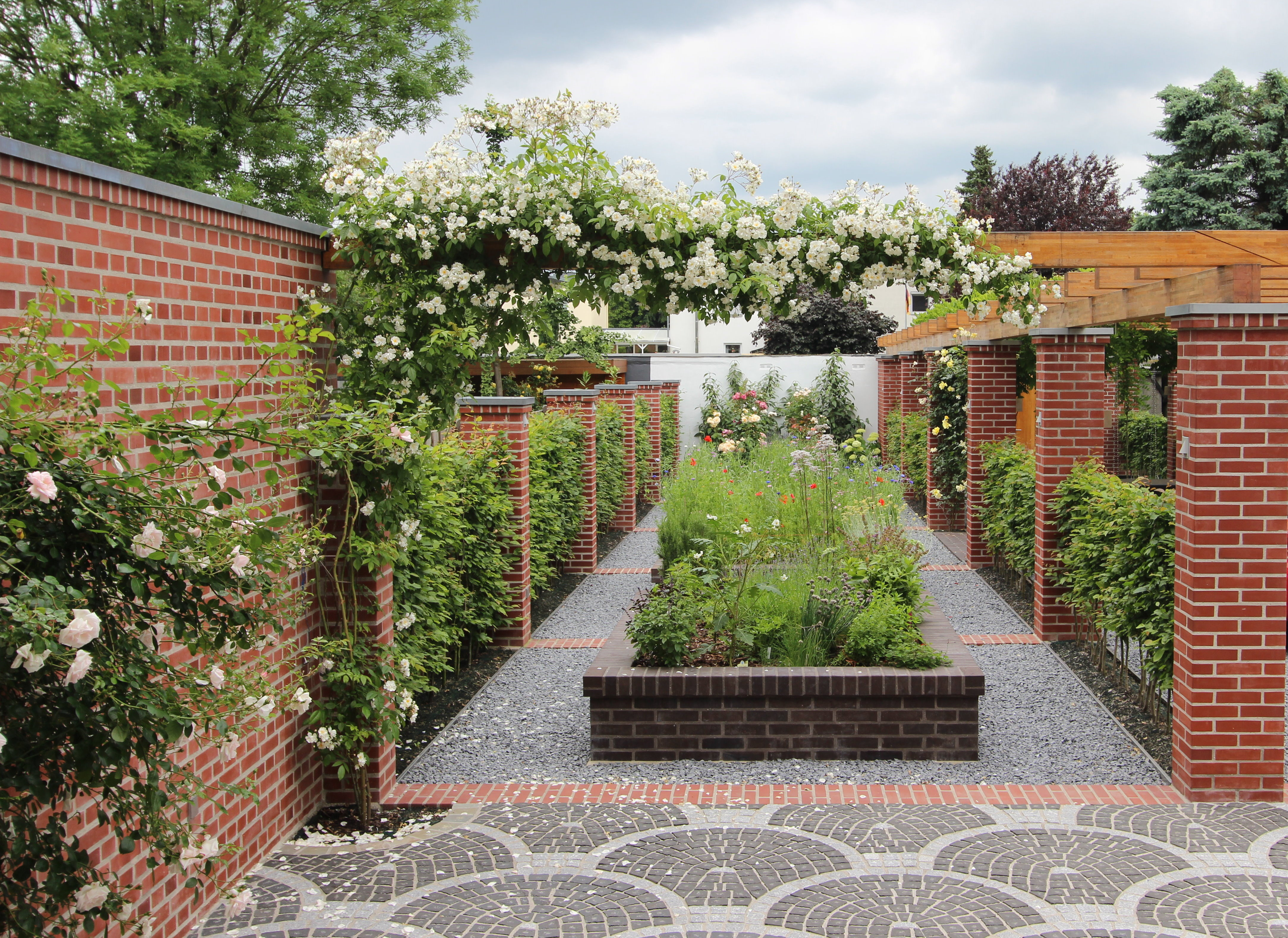 Hochbeete im privaten Themengarten. Jedes der fünf gemauerten Hochbeete haben unterschiedliche Themen, wie z.B. Kräuter, Wildblumen, Wasser, Rosen sowie Azaleen. Aufnahme aus Süd-Osten von 2016.